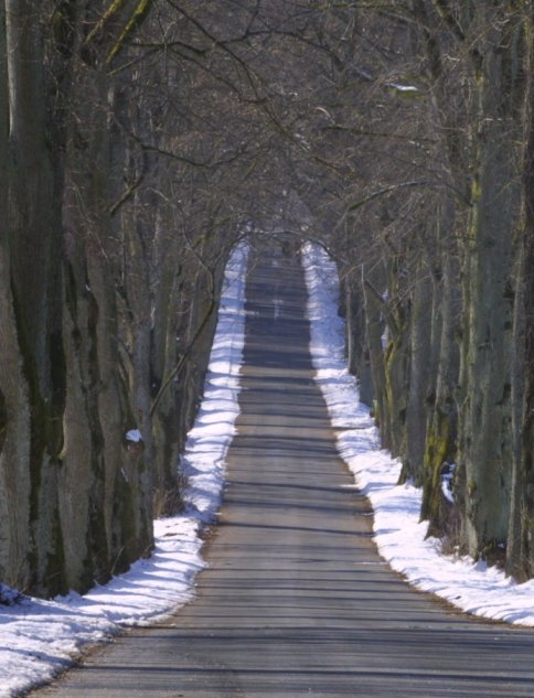 Allee zu Schloss Greifenstein im Februar 2005